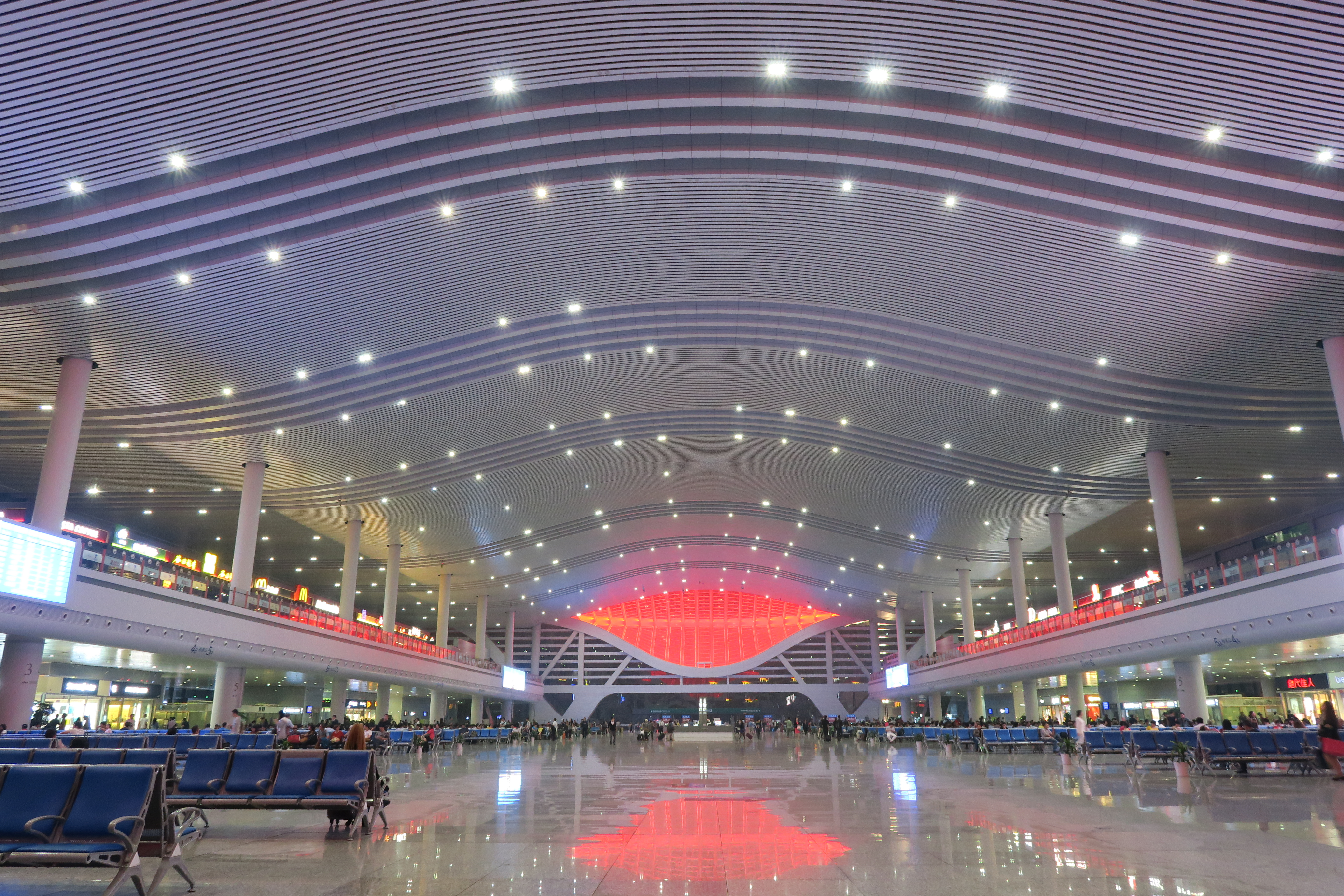 宁波火车站夜间内景